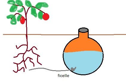 La jarre est percée d'un trou, dans lequel on passe une corde ou ficelle retenue par un nœud. L'eau va remonter la corde par capillarité et irriguer la plante.